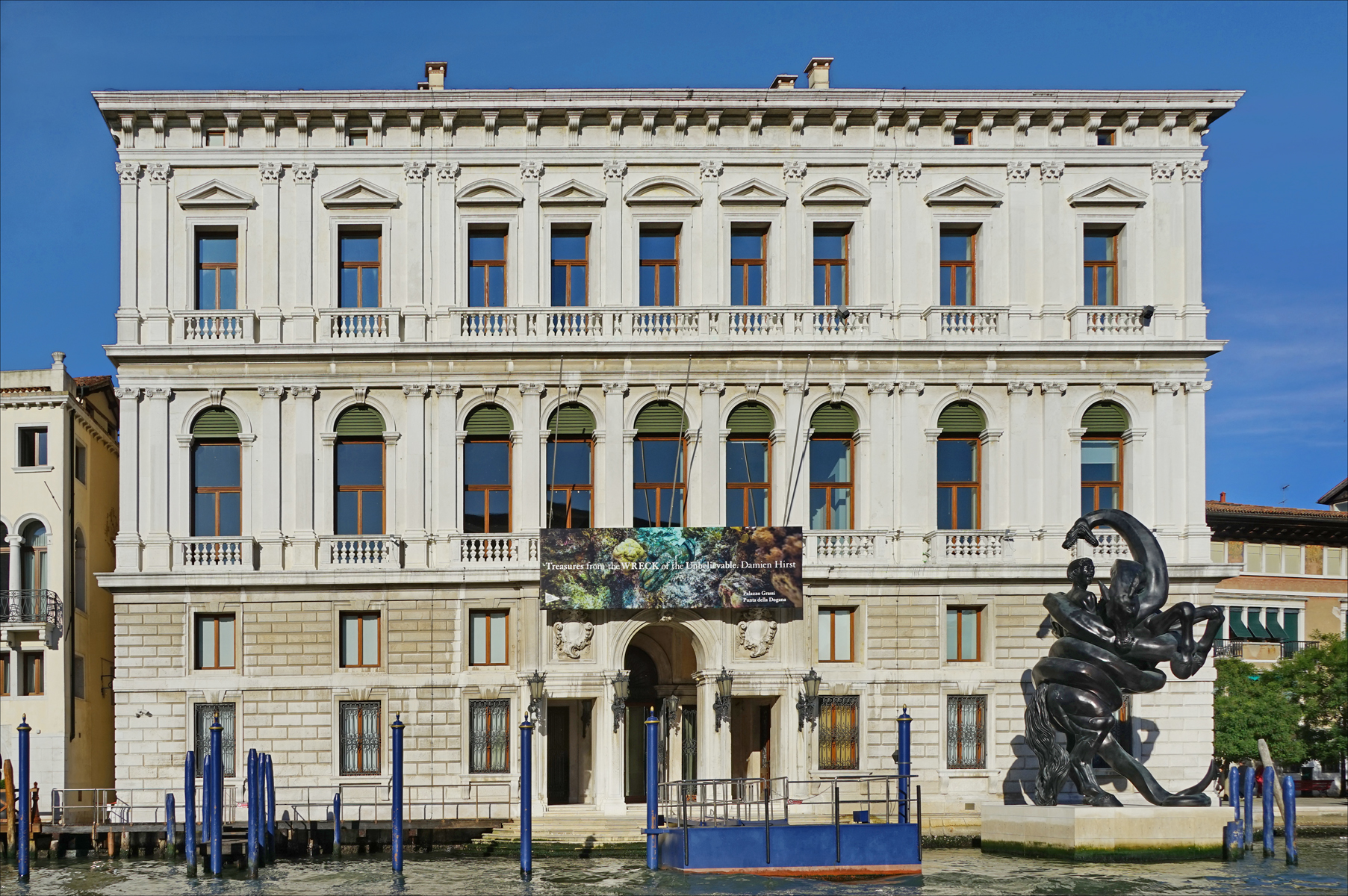 Le palazzo Grassi a été aménagé par l'architecte japonais Tadao Ando à la demande de François Pinault pour accueillir sa collection d'art contemporain. Le bâtiment possède 40 salles, sa surface est de 5.000 m2. Il a été inauguré en avril 2006. Une sculpture de Damien Hirst est placée devant le bâtiment. Cette oeuvre fait partie de l'exposition à grand spectacle intitulée "Treasures from the wreck of the unbelievable" conçue par Damien Hirst. Le palazzo Grassi a été construit dans le style néo-classique, au début du XVIIIème siècle, pour la famille Grassi par Giorgio Massari. Dès 1830, il a changé de propriétaires plusieurs fois parmi lesquels figure la société FIAT en 1984. Les architectes : Gae Aulenti et Antonio Foscari l'ont restauré pour lui permettre d'accueillir des expositions, tout en respectant son caractère.